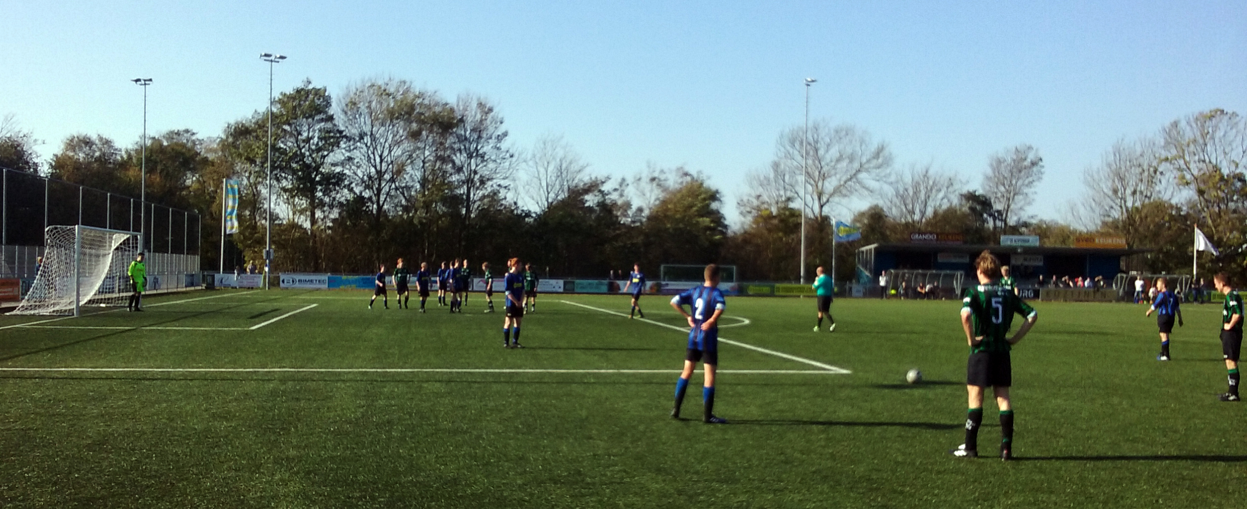 Competitiewedstrijd tussen JVC o19-1 en Alliance '22 o19-1, Hoofdklasse C W1 (2017/18).